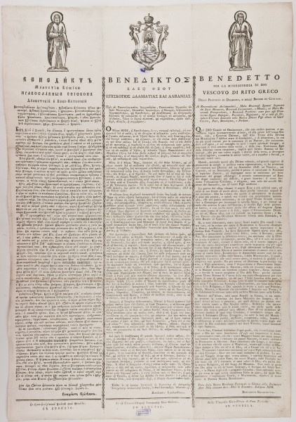 Поздравително слово на Венедикт към православното паство и свещенство по повод поставянето му за първи епископ на самостоятелната сръбска епископия в Далмация и Бока Которска. На църковнославянски, гръцки и италиански, Венеция, 1810 година.